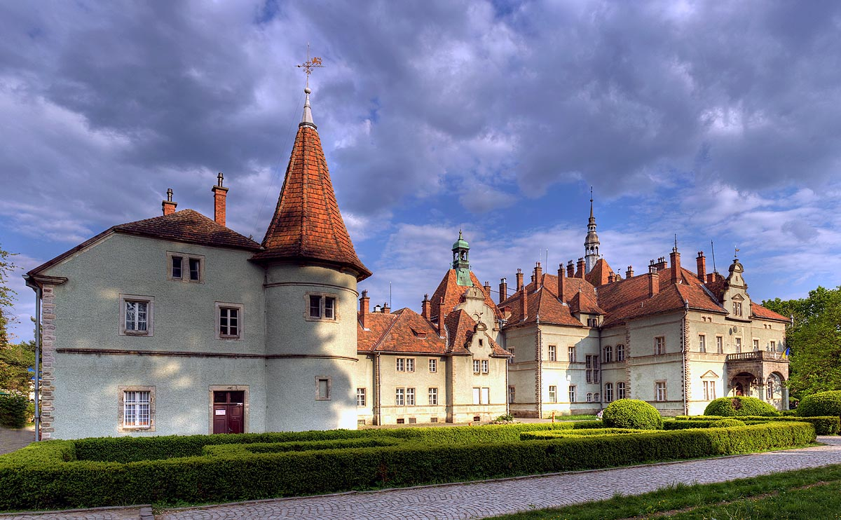 Палац графів Шенборнів у селі Карпати (Чинадіївська селищна рада, Мукачівський район, Закарпатська область)